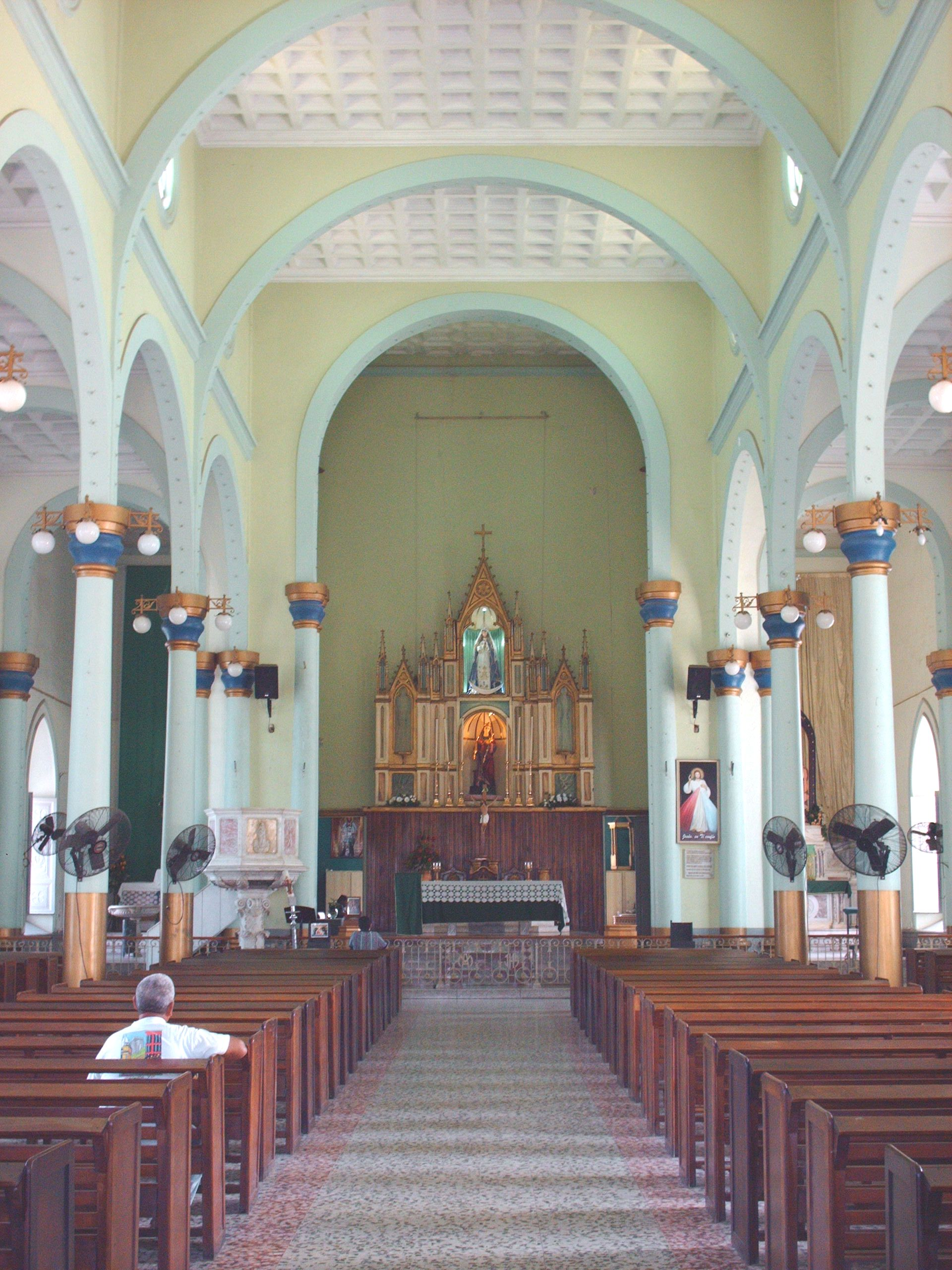 Interior de la Iglesia de Santa Bárbara, Maracaibo, Estado Zulia, Venezuela.